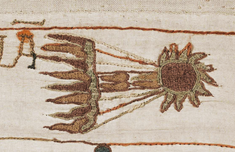 la comête de Halley